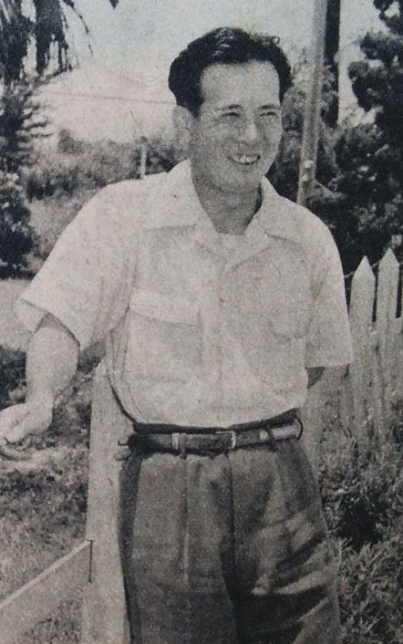 呉昌征